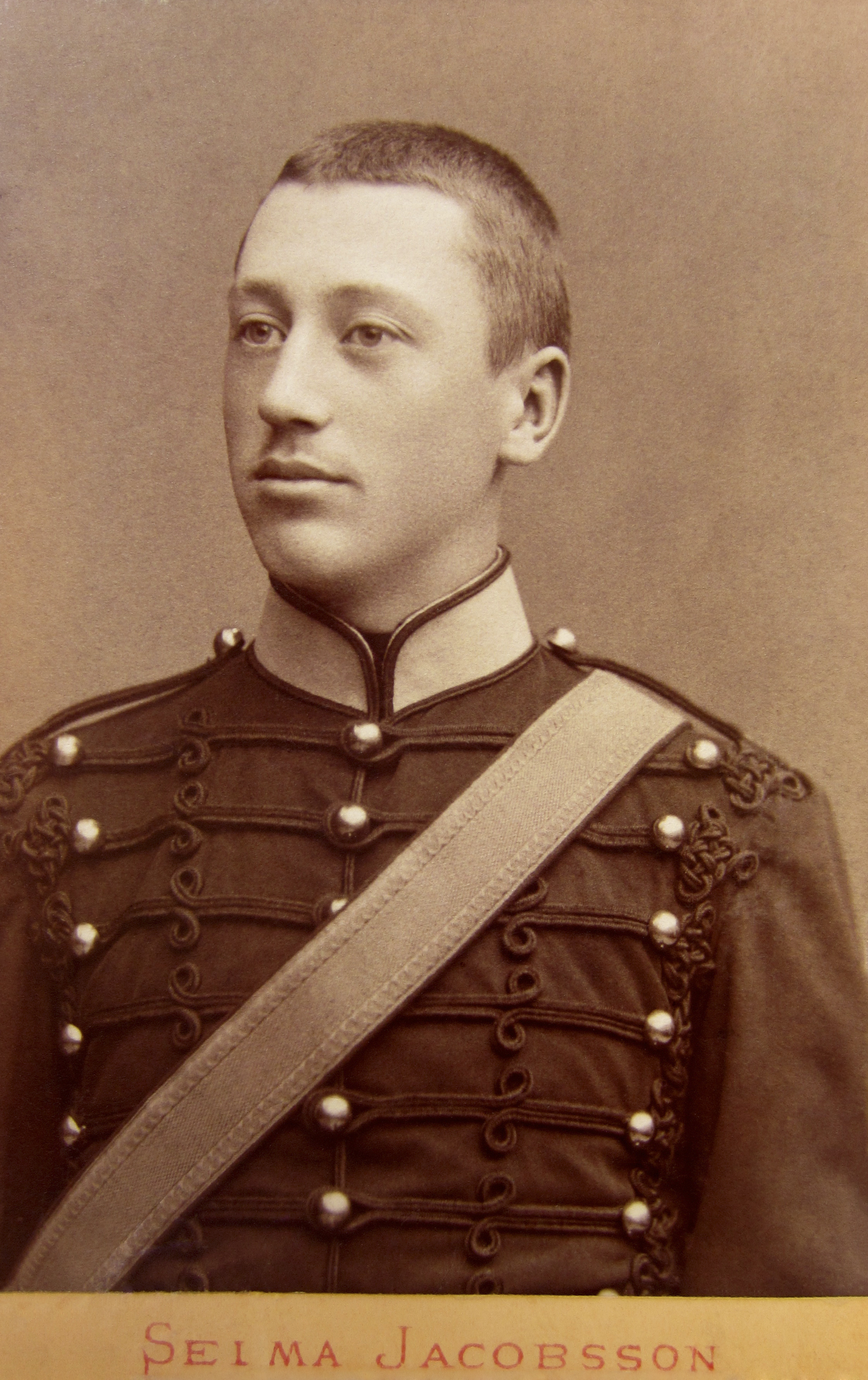 Allan Abenius (1868–1953), bror till Märta och svåger till Hjalmar Söderberg